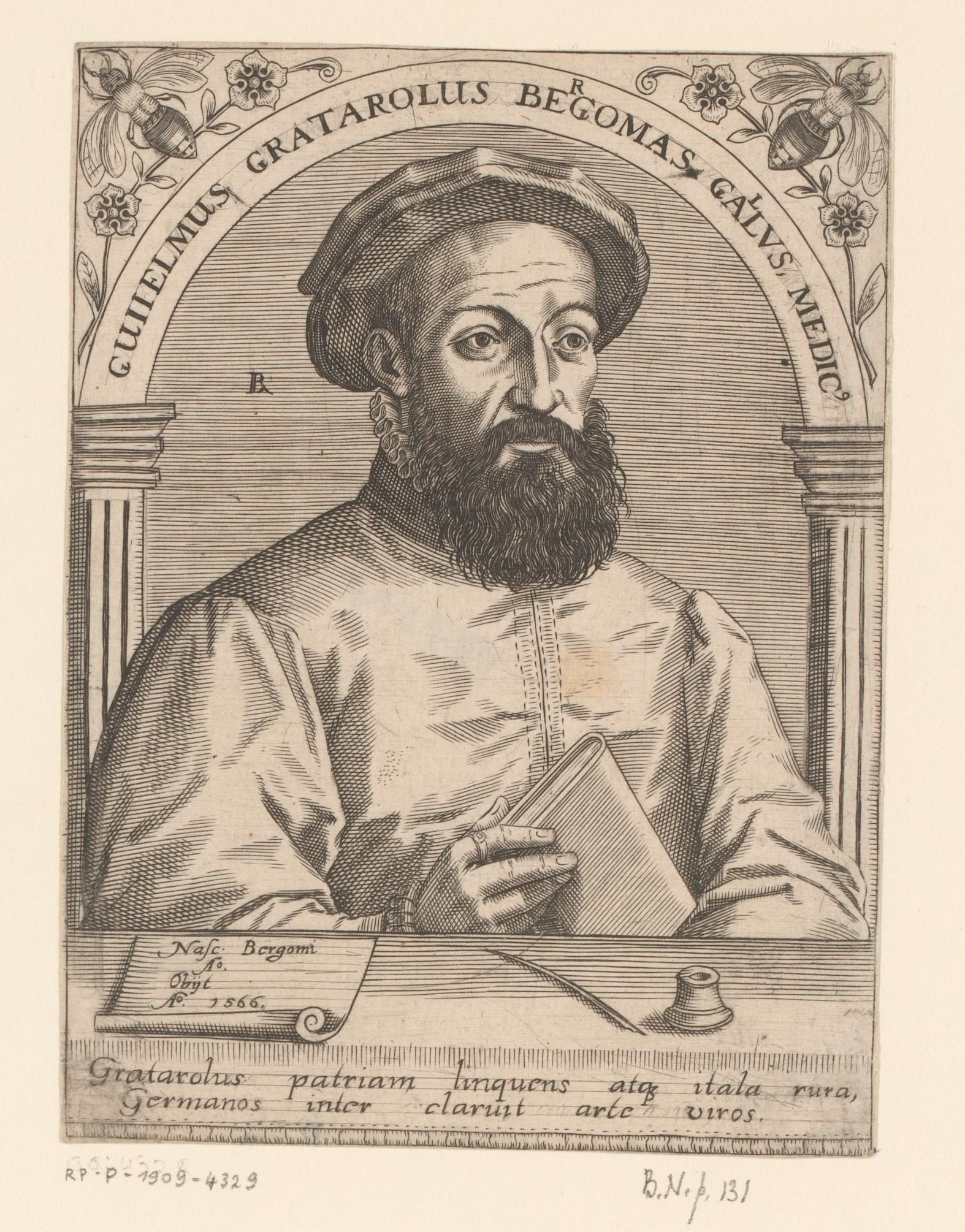 IdentificatieTitel(s): Portret van Guglielmo GrataroloGuiielmus Gratarolus Bergomas Gallus medic' (titel op object)Serie portretten van vijftiende- en zestiende-eeuwse geleerden (serietitel)Objecttype: prent boekillustratie Objectnummer: RP-P-1909-4329Opschriften / Merken: verzamelaarsmerk, verso, gestempeld: Lugt 2228VervaardigingVervaardiger: prentmaker: Robert Boissard (vermeld op object)prentmaker: Johann Theodor de Bry (verworpen toeschrijving)uitgever: Guilielmi FitzeriPlaats vervaardiging: FrankrijkDatering: 1597 - 1599Fysieke kenmerken: gravure; tekst in boekdruk op versoMateriaal: papier Techniek: graveren (drukprocedé) / boekdrukAfmetingen: blad: h 143 mm (Binnen plaatrand afgesneden.) × b 105 mm (Binnen plaatrand afgesneden.)ToelichtingPrent uit: Boissard, Jean-Jacques; Bry, Theodoor de; e.a. Bibliotheca sive thesaurus virtutis et gloriae in quo continentur illustrium eruditione et doctrina virorum effigies et vitae (...). Frankfurt: Guilielmi Fitzeri, 1628.OnderwerpWat: historical personsbookink-wellinsects: beeflowersWie: Guglielmo GrataroloVerwerving en rechtenVerwerving: aankoop 1905Copyright: Publiek domein